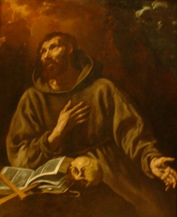 La vision de saint François d'Assise, tableau de Luis Tristan, musée du Louvre (RF 240).